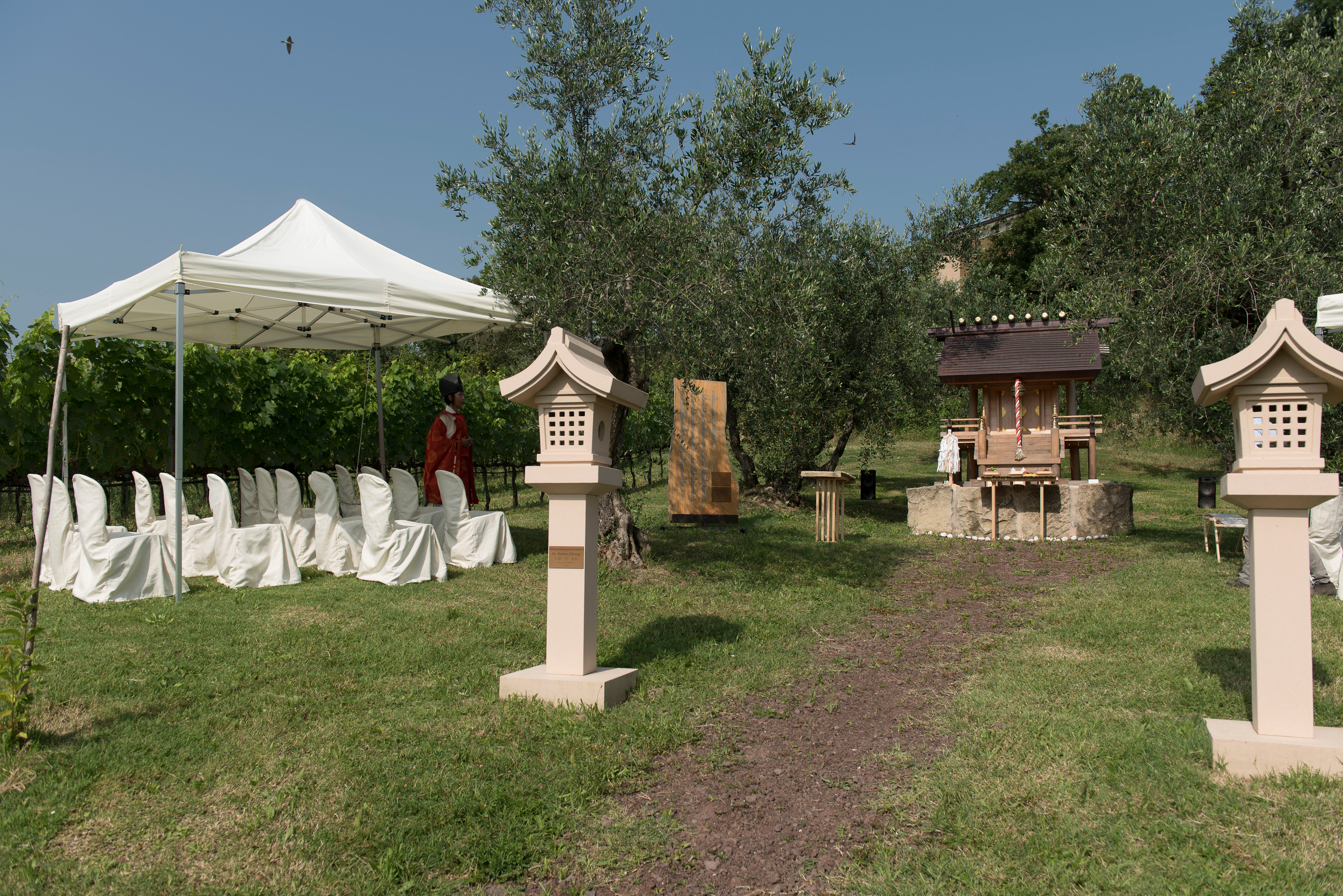 Il santuario San Marino Jinja e i Toro all'ingresso